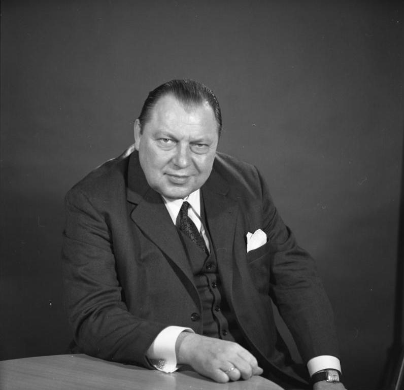 Dr. Hermann Schmitt-Vockenhausen (Bundestagspräsident)